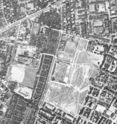 Obszar Poznania między kwadratem ulic Grunwaldzka - Ułańska, Jarochowskiego - Chociszewskiego - Promienista, sfotografowany przez amerykańskiego satelitę wywiadowczego KH-4A 1023, 23 sierpnia 1965 r. Pośrodku rozległy plac ze boiskiem - przyszły Park Kasprowicza z halą Areny. Powyżej po prawej - koszary na ulicy Ułańskiej. Na lewo od nich Park Manitiusa. Na lewo od boiska, plac pod przyszłe obiekty Wojskowego Klubu Sportowego Grunwald-Poznań.